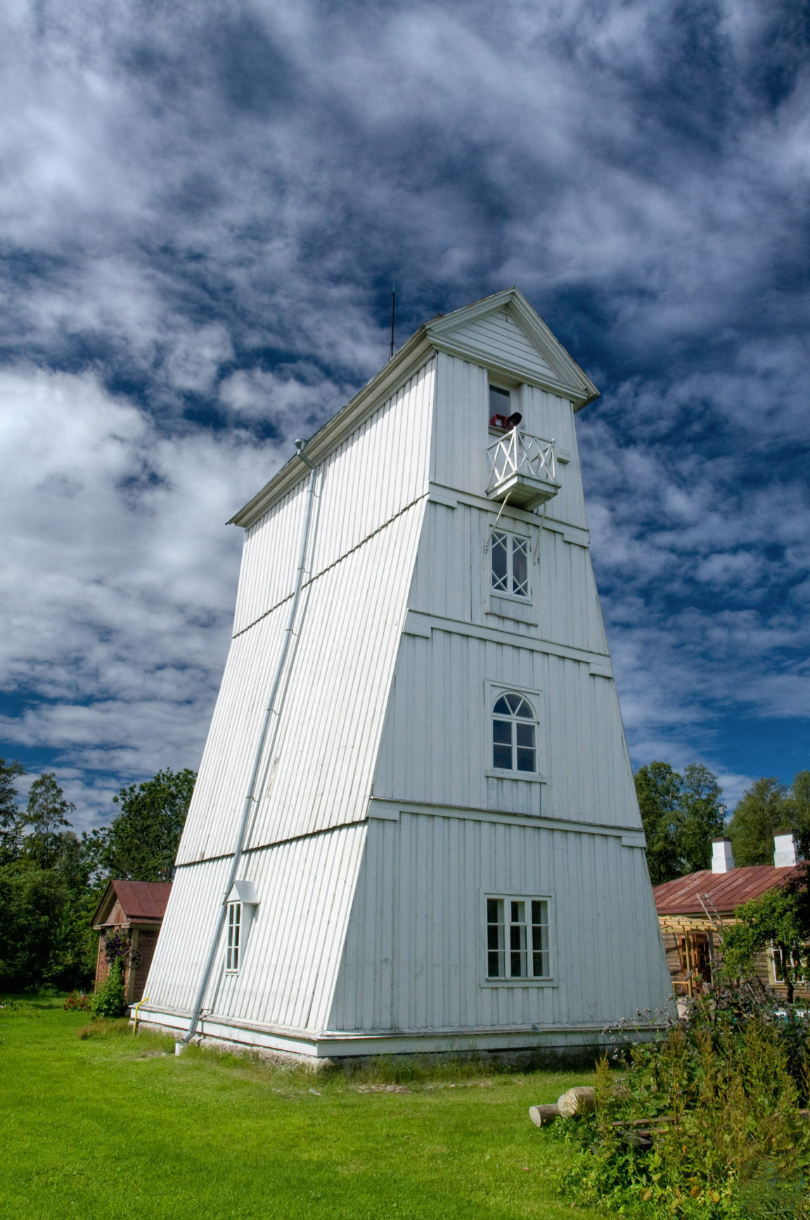 Suurupi alumine tuletorn